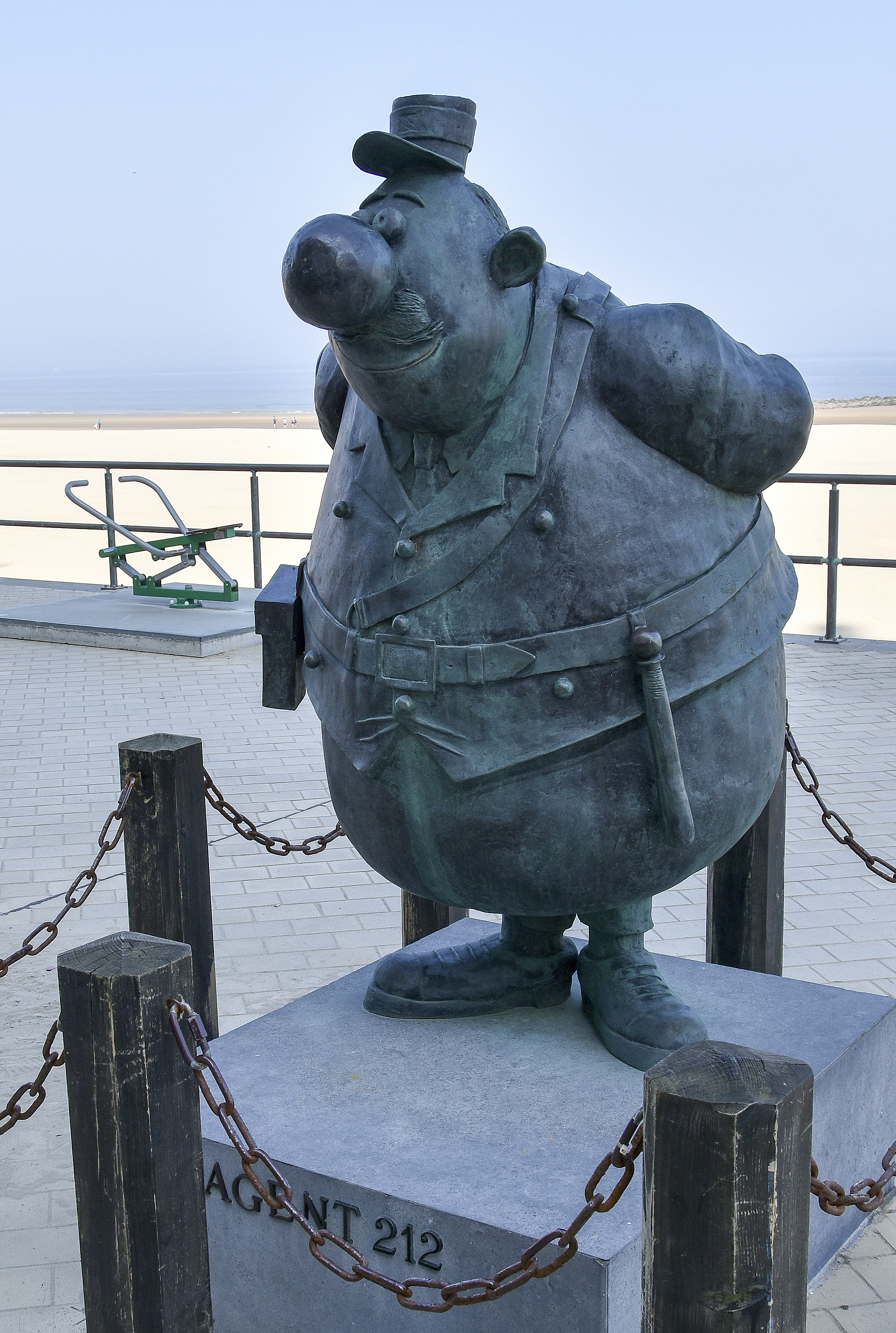 Jan Maillard - Nero - Stripstandbeelden Middelkerke